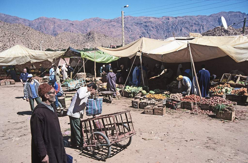 Tafraoute, Markttag